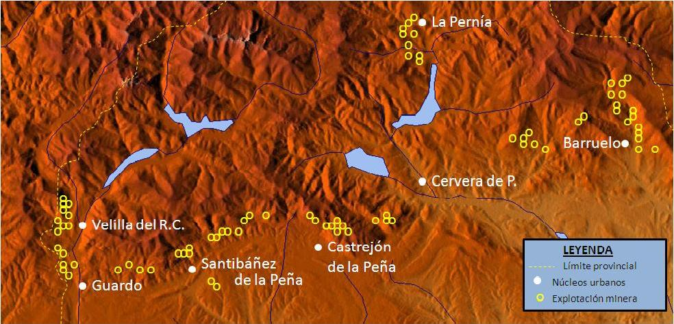 Mapa físico de las principales explotaciones mineras de la provincia de Palencia, España.